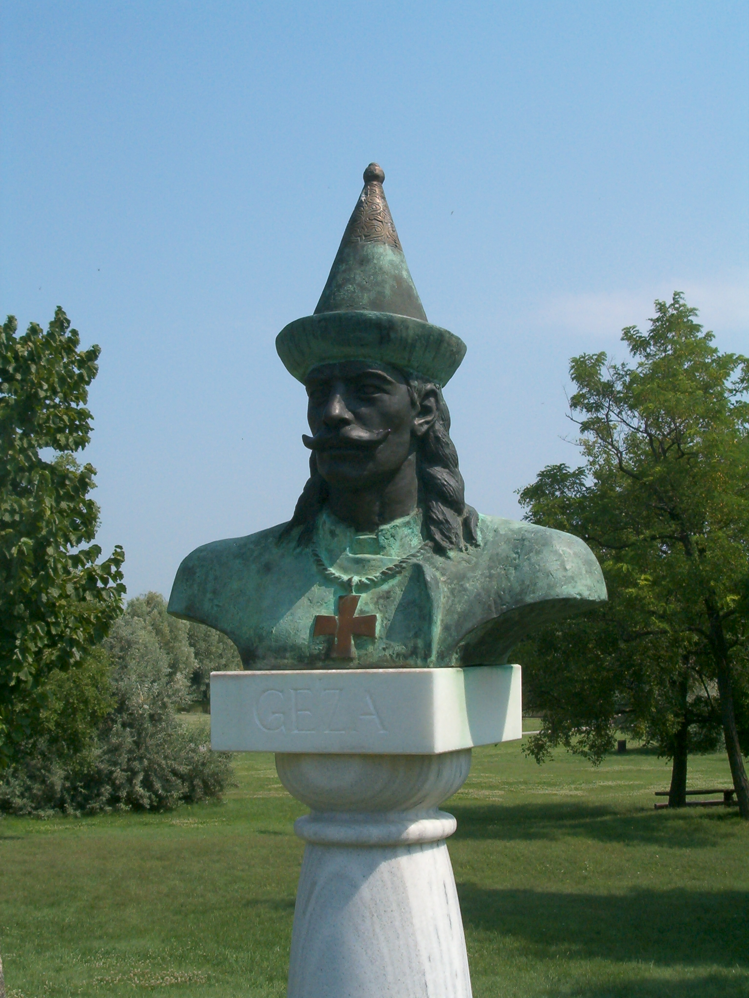 Géza fejedelem Nemzeti Történeti Emlékpark / National Historical Memorial Park in Ópusztaszer, Hungary (Tóth Sándor alkotása) self shot photo (2005), Váradi Zsolt